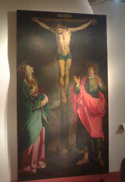 Carassai - Andrea Boscoli - Crocefissione - 1601